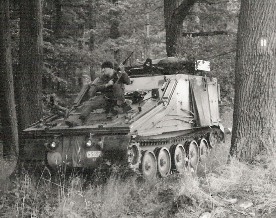 Char CVRT type Samaritan - 4e Chasseurs à Cheval - FTX Golden Crown 1988